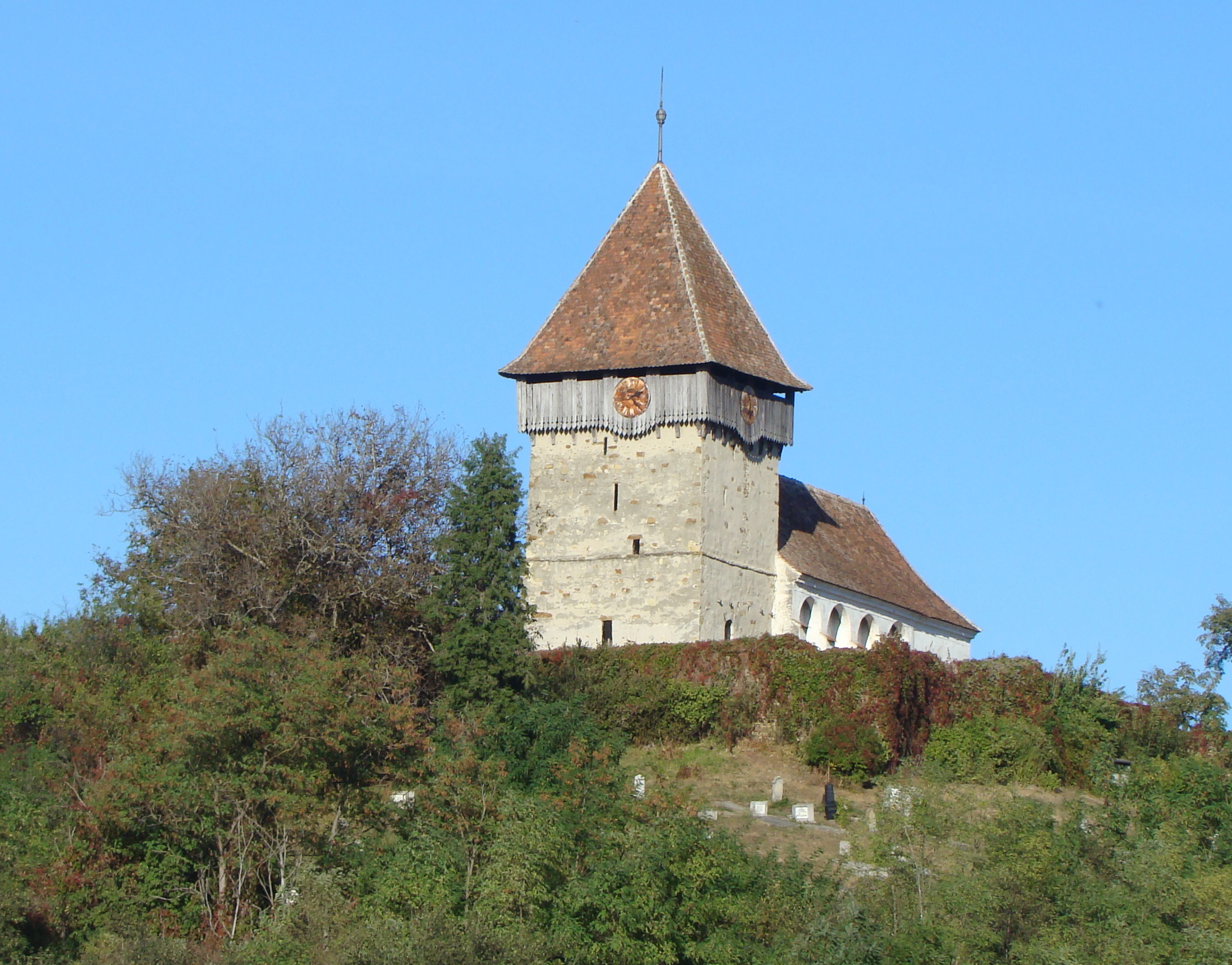 Ansamblul bisericii evanghelice fortificate, sat Rodbav; comuna Șoarș 115 sec. XIII-XIX